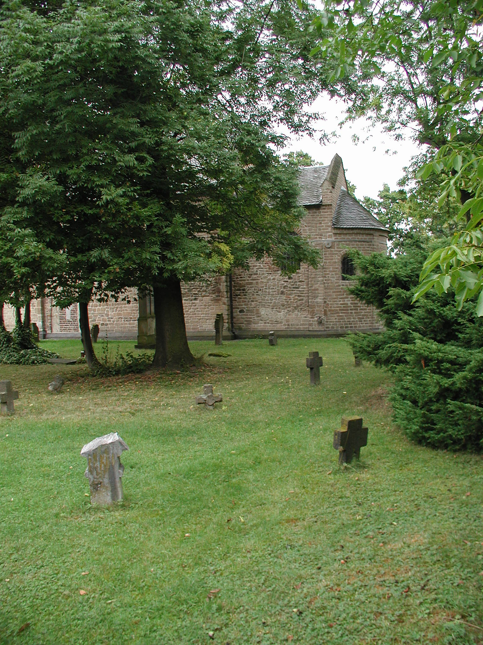 Koeln-Kriel, Kirchhof Krieler Dom